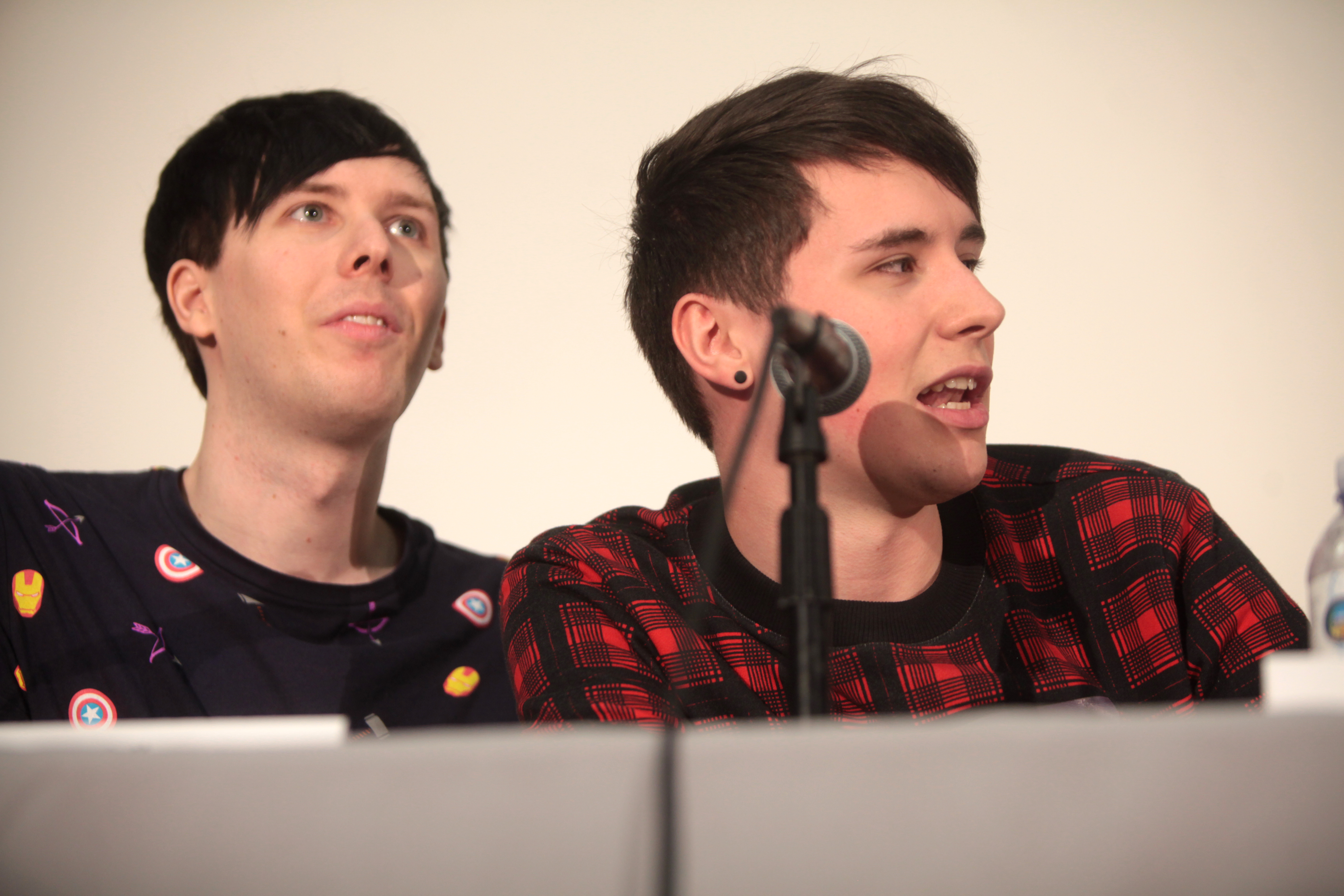 Dan ve Phil VidCon 2014